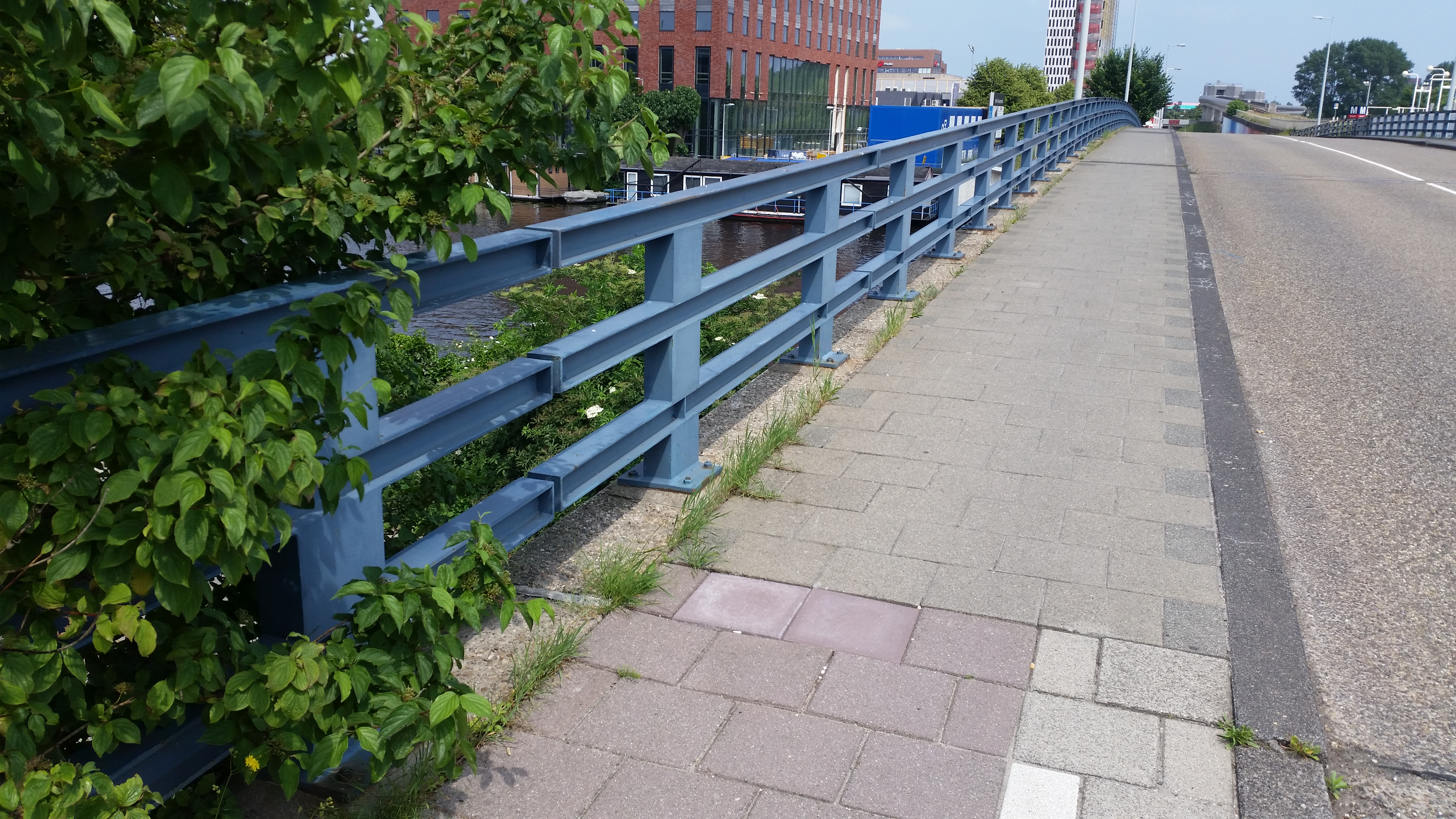 Brug 854, Duivendrechtsevaart, Amsterdam, noordelijke leuning